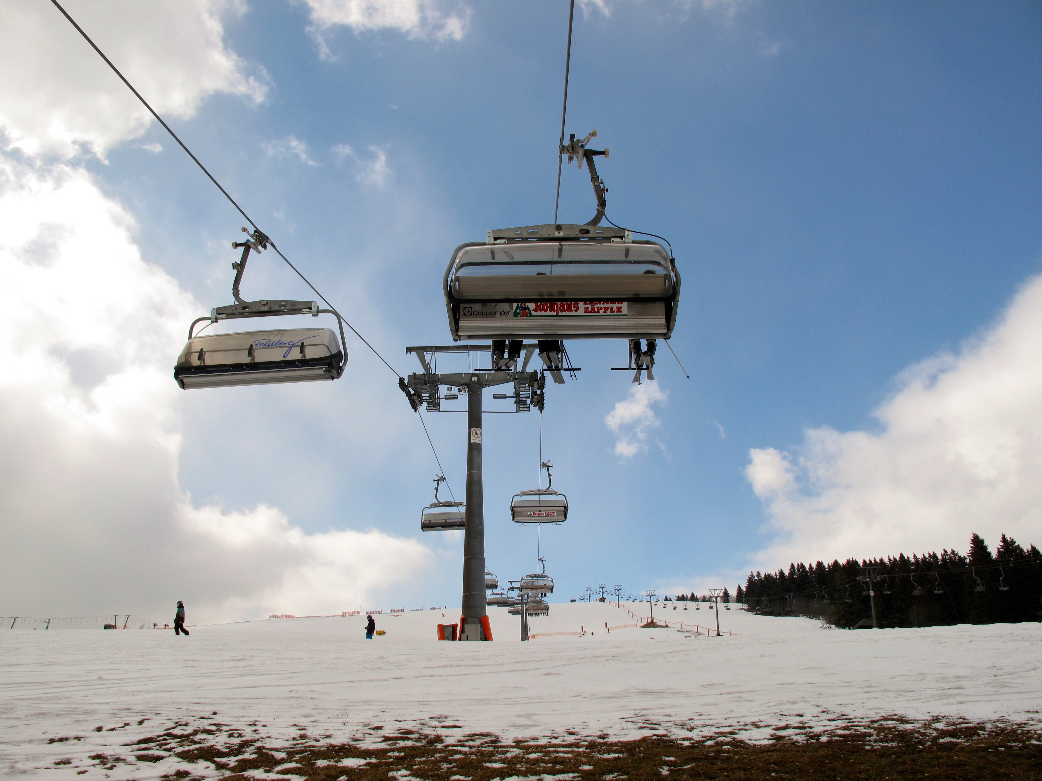 Sessellift am Feldberg gegen Saisonende